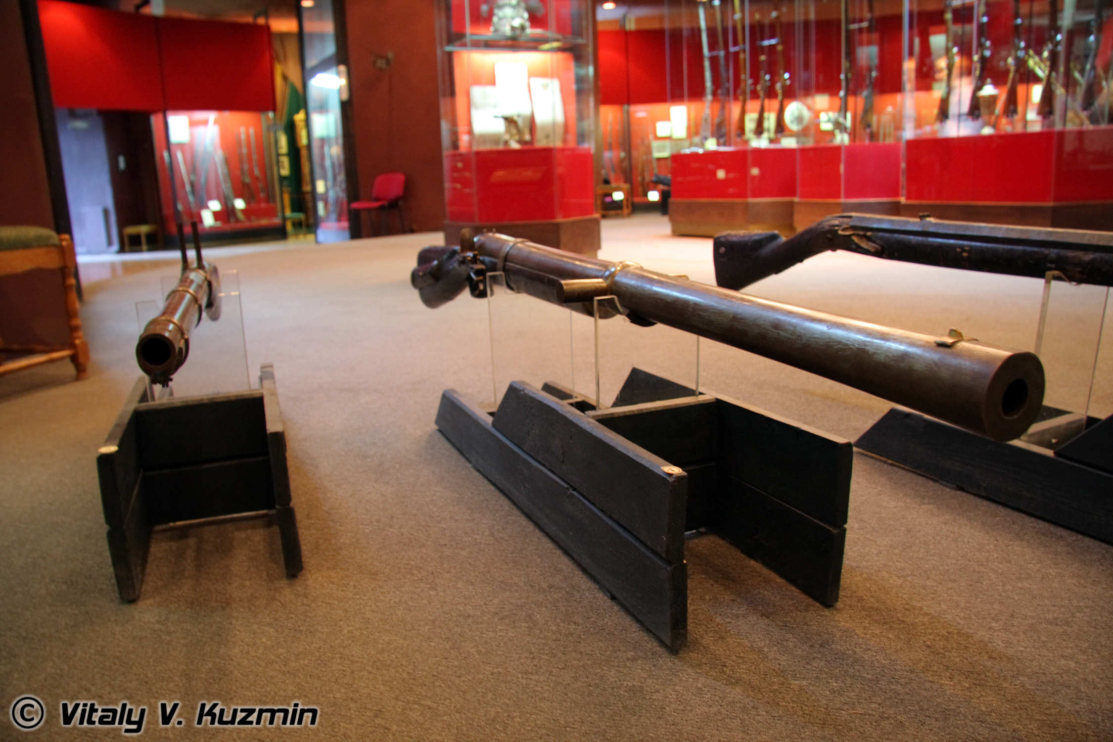 Русские стенные орудия (defence wall guns)